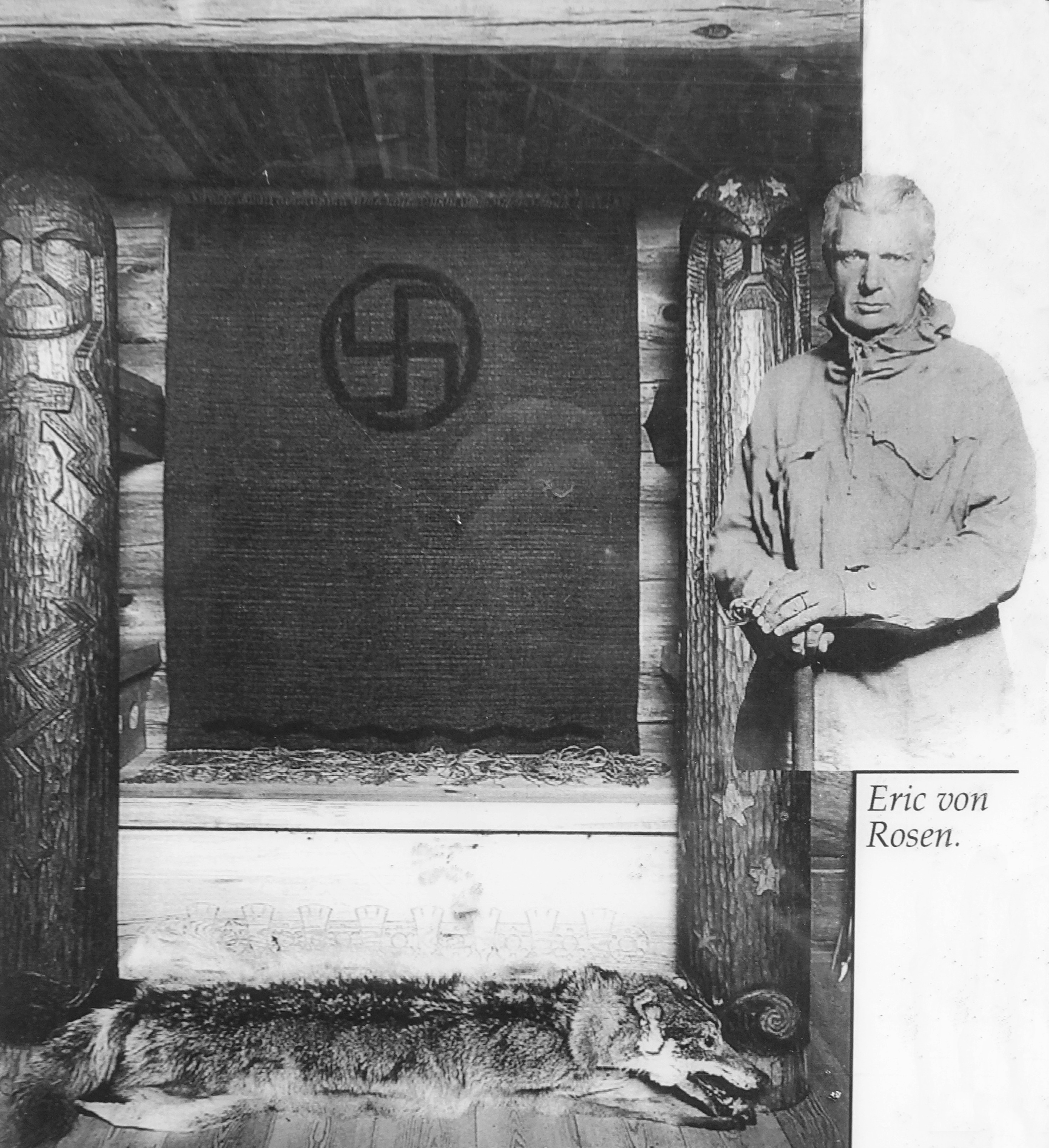 Eric von Rosens jaktstuga, interiör